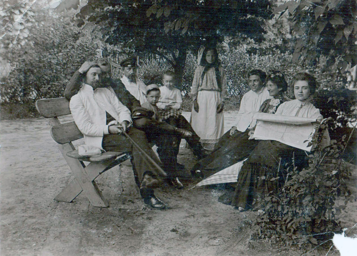 Густав шольц (слева) с семьей. Город Сумы начало XX века.